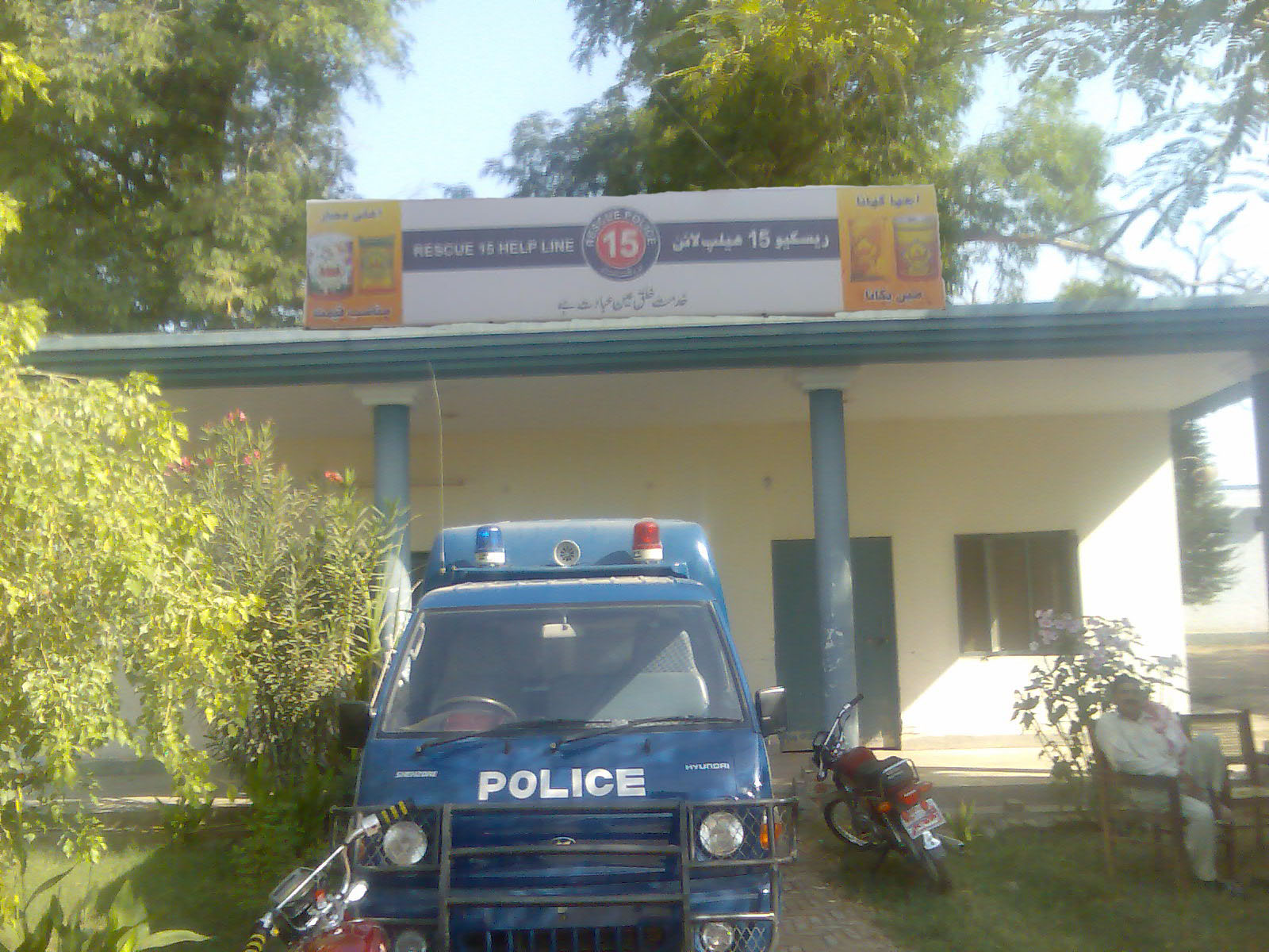 Rescue 15 Ahmadpur East